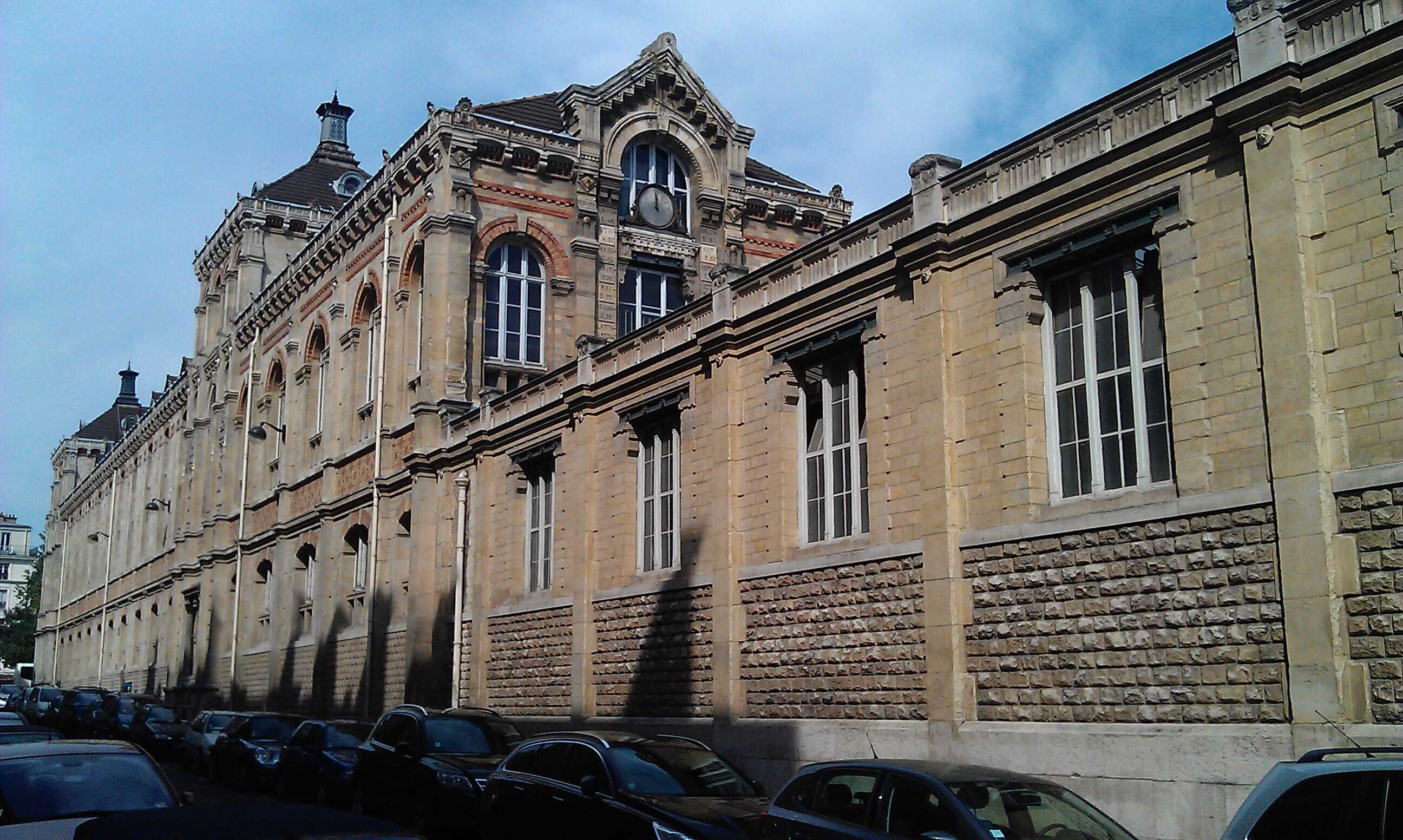 Lycée Chaptal . This photo was uploaded with Wiki Loves Monuments mobile 1.2.1 (Android).